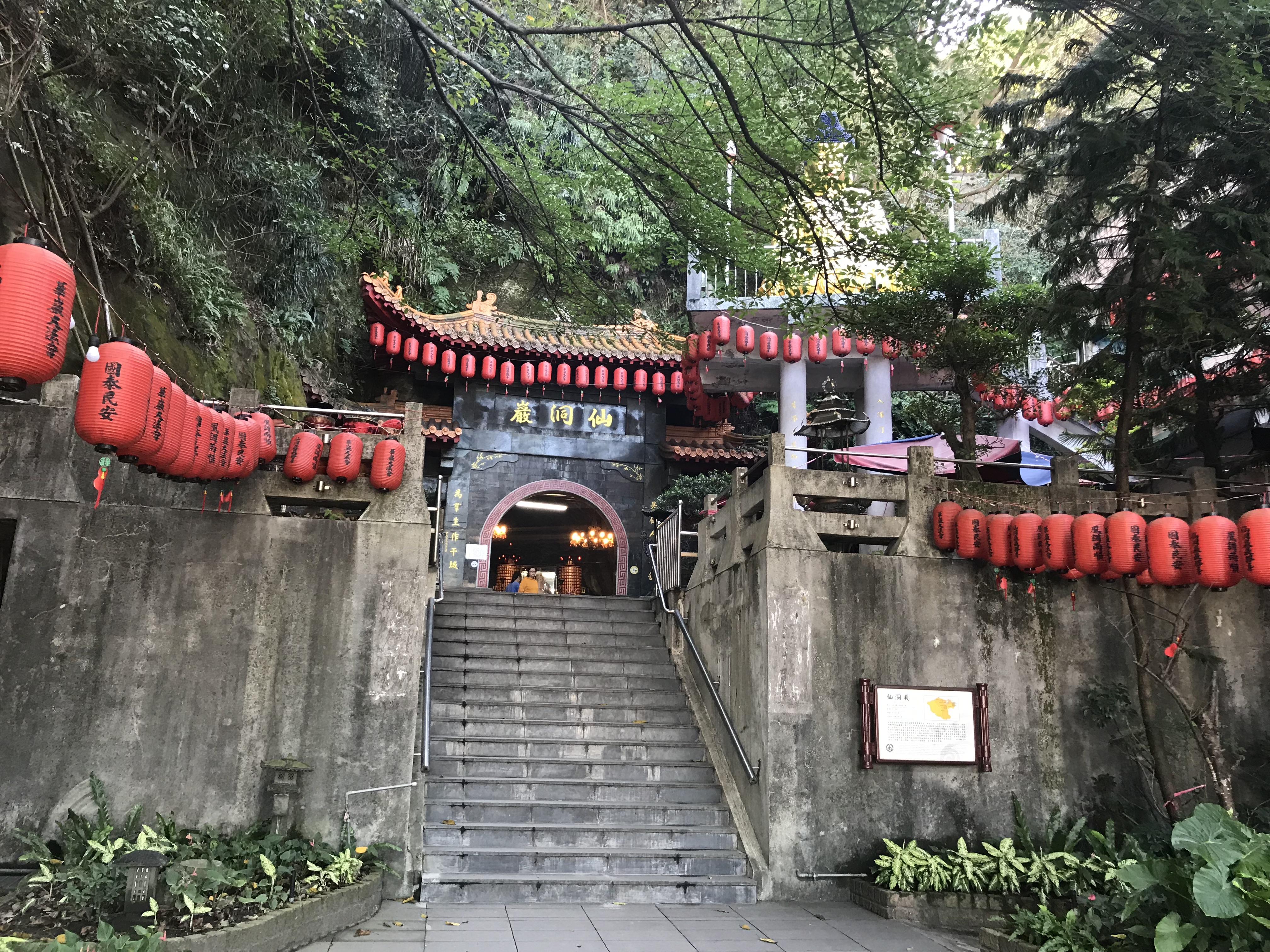 仙洞巖山門